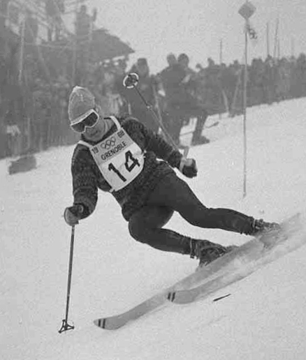 Bengt-Erik Grahn, Grenoble Olympics